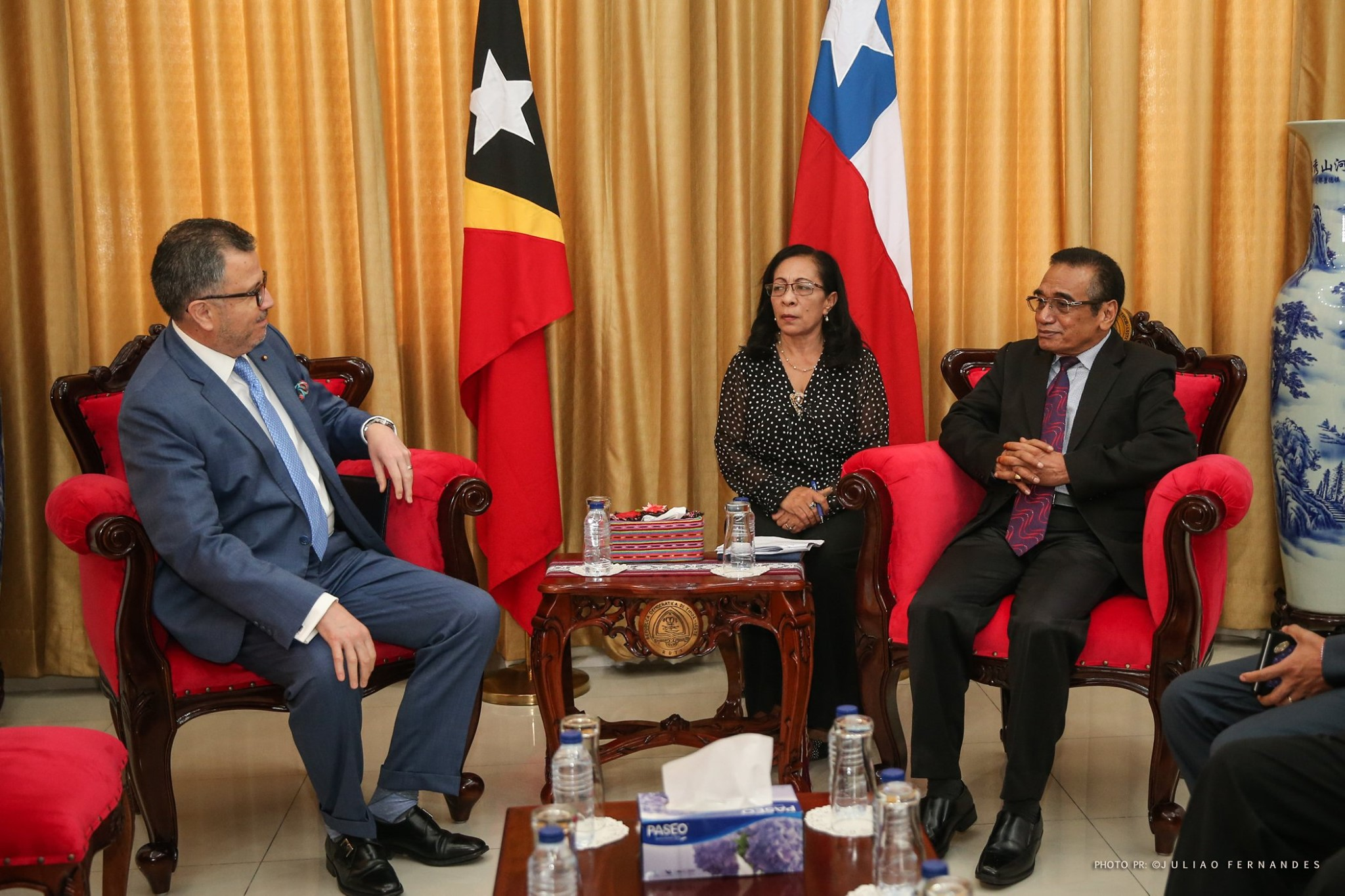 Gustavo Ayares Ossandón bei der Übergabe seiner Akkreditierung als chilenischer Botschafter bei Osttimors Präsident Francisco Guterres